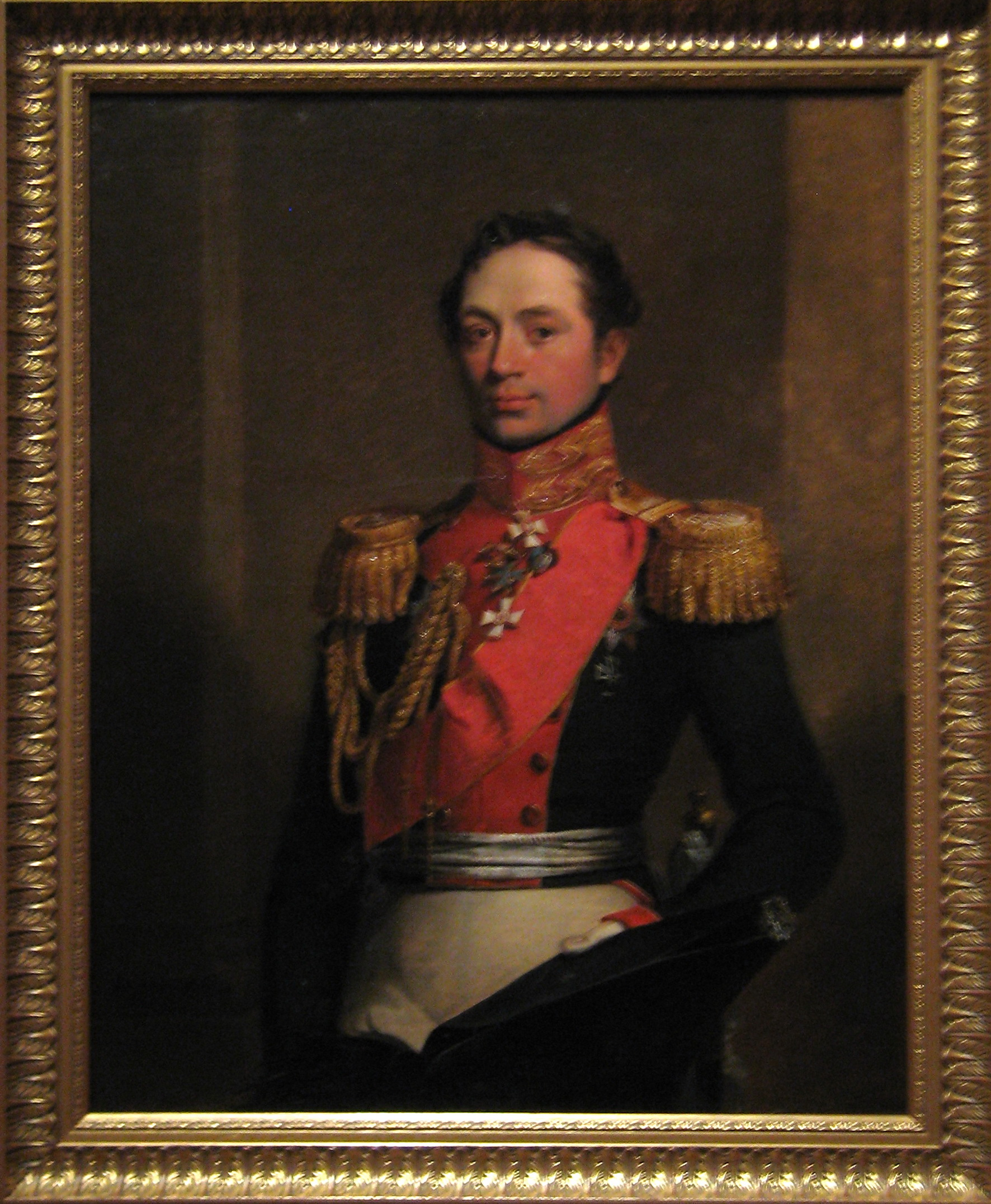 Выставка "Национальная портретная галерея", ГИМ, 2012